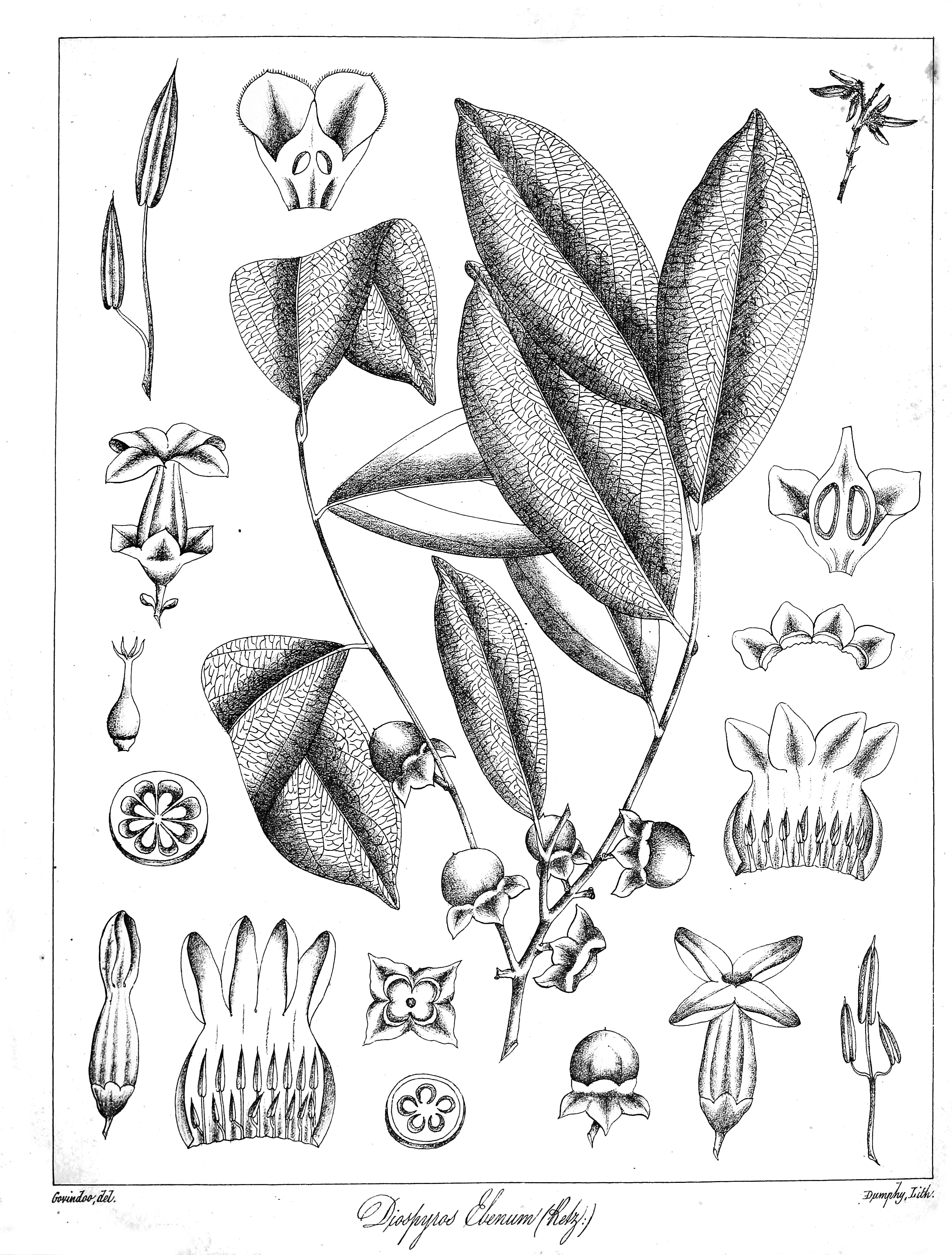 Diospyros ebenum